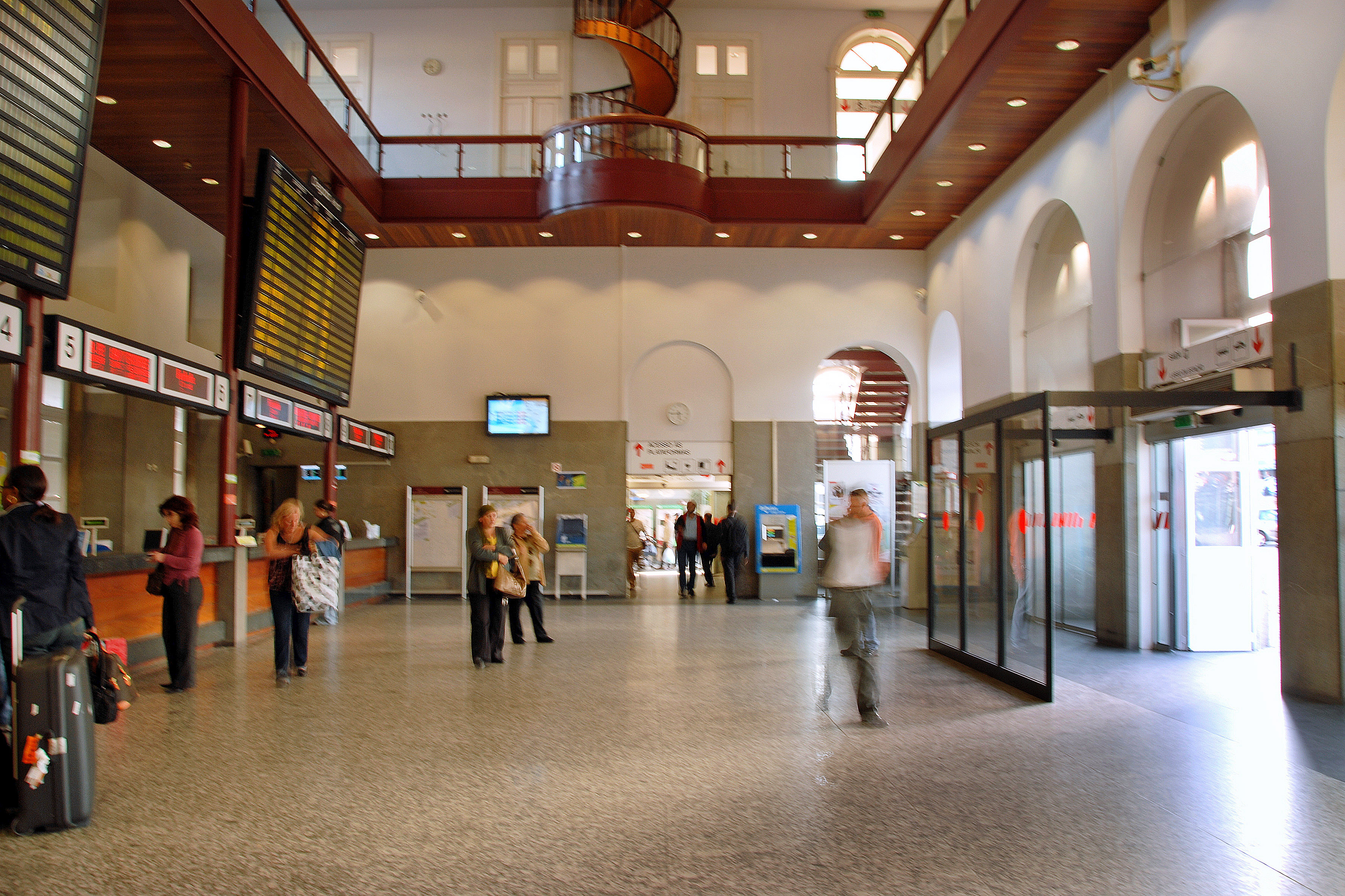 Campanhã-Estação Ferroviária de Campanhã This file was uploaded for Wiki Loves Monuments in Portugal with the unique identifier 97023030.